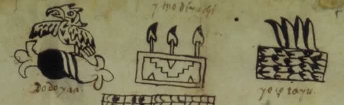 Fragmento del códice Mixteco Post-cortesiano No. 36. Forma parte de la colección de la Biblioteca Nacional de Antropología e Historia (México). En este fragmento aparecen tres glifos toponímicos según convenciones de la escritura mixteca precolombina, cada uno con una glosa en mixteco escrita en caracteres latinos. De izquierda a derecha, las glosas dicen Dodoyaya ('Peña de las Águilas), Itnodiyuchi ('Cuesta de los Cuchillos') y Yoçotayu ('Llano del ixtle').